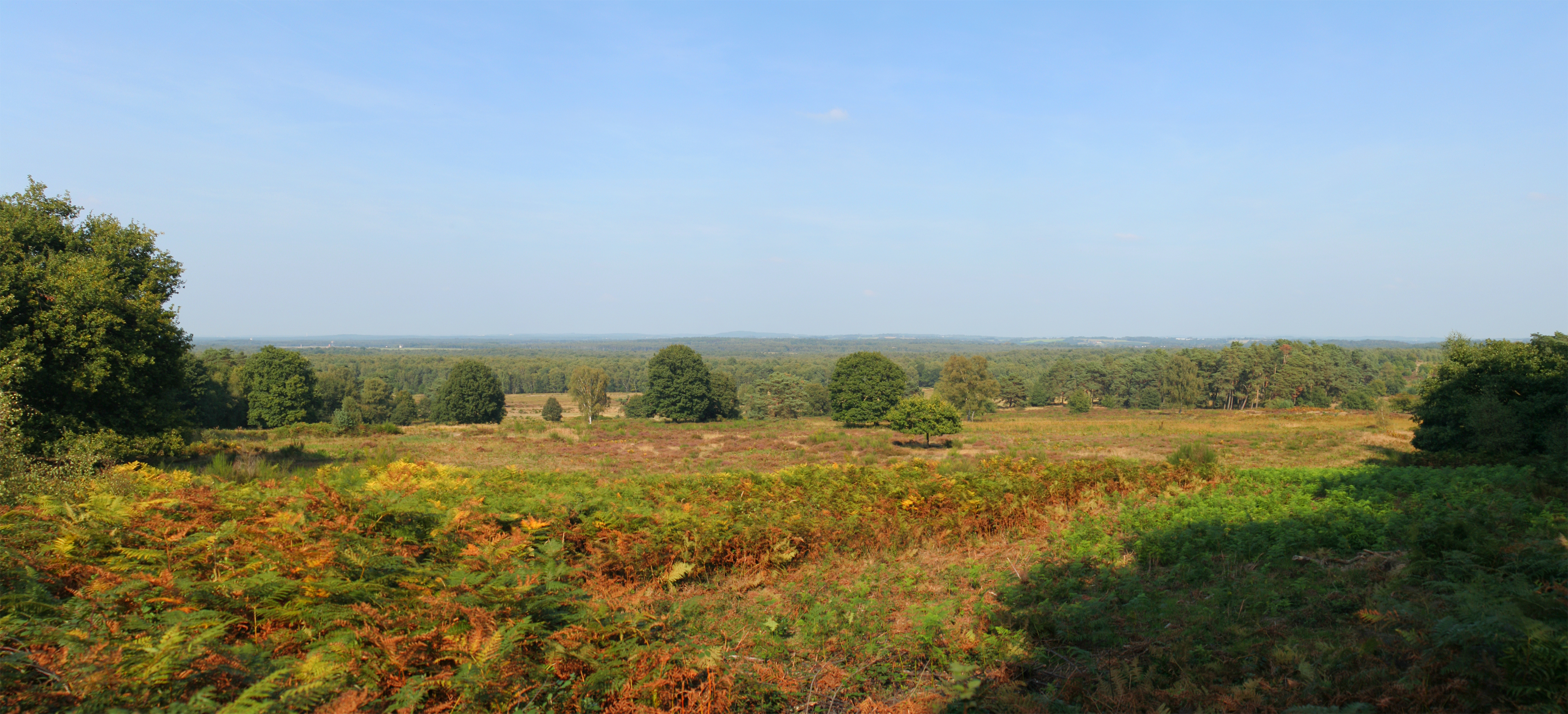 Wahner Heide, Aussicht vom Telegraphenberg während der Heideblüte, Naturschutzgebiet „Wahner Heide im Rhein-Sieg-Kreis“/Troisdorf